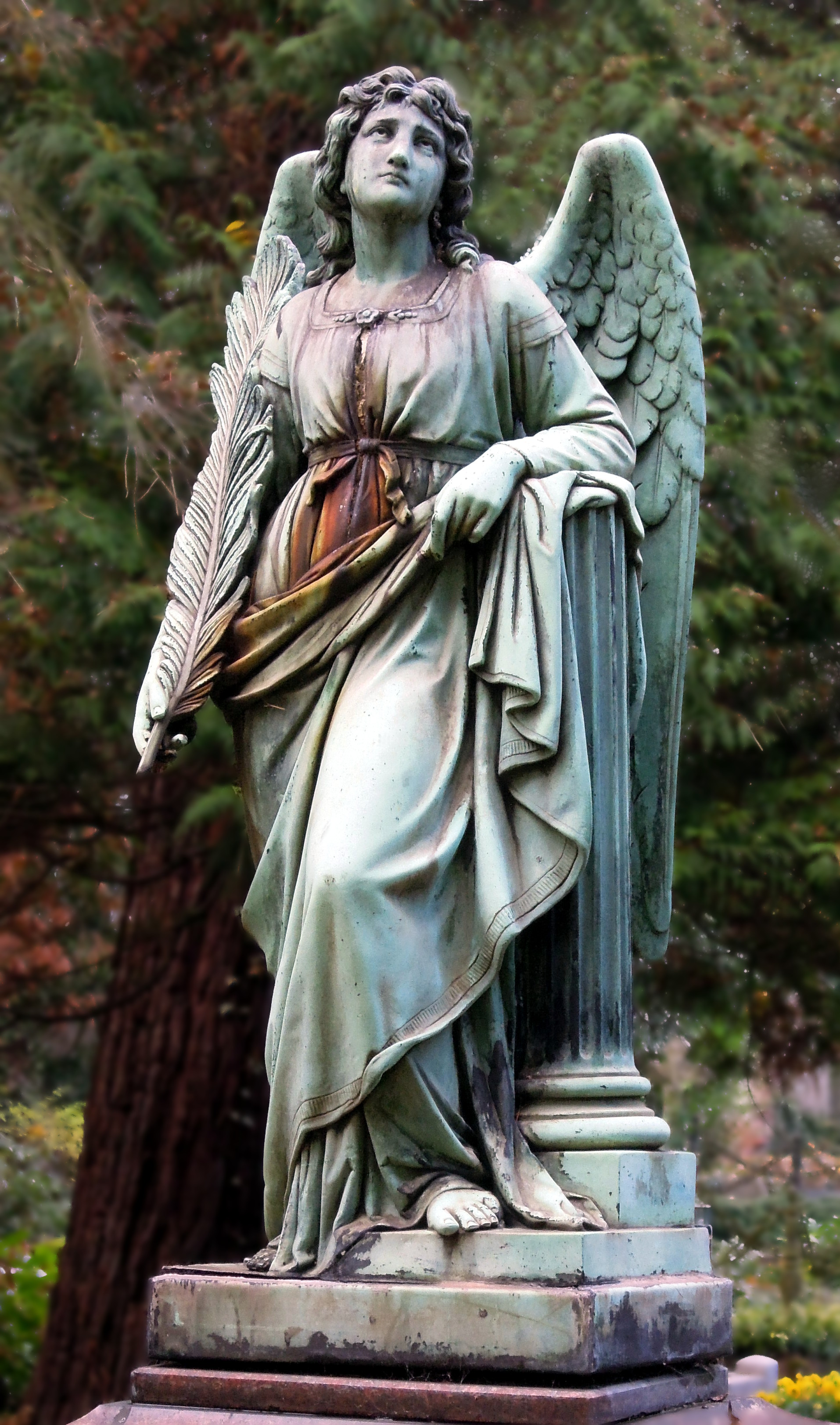 Familie Kenn